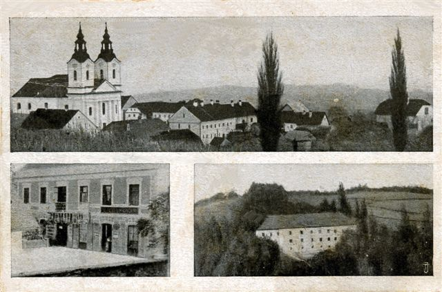 Grad Raka